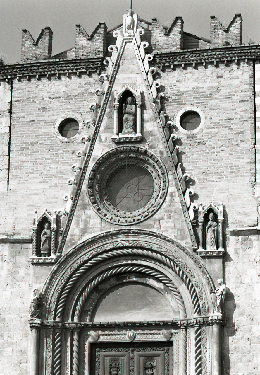 Servizio fotografico : Italia, 1969 / Paolo Monti. - Strisce: 3, Fotogrammi complessivi: 15 : Negativo b/n, gelatina bromuro d'argento/ pellicola ; 35 mm. - ((I fotogrammi hanno una doppia numerazione. . - Sul portanegativi: Nikon FP4. - Sul dorso del portanegativi Monti specifica: "Pietre. Muri. Porte. Leoni". - Occasione: Documentazione per la pubblicazione: "TOURING CLUB ITALIANO, Marche, Milano, TCI, 1971". - Fonte: Agenda di Paolo Monti: Monti/ 3 aprile 1966 - 9 marzo 1971/ 12421-16823 (1966-1971), presso Archivio Paolo Monti. - Fonte: Monografia: TOURING CLUB ITALIANO, Marche, Milano, TCI, 1971 (1971). - Fonte: Agenda di Paolo Monti: Monti - Agenda 1969 (1969), presso Archivio Paolo Monti